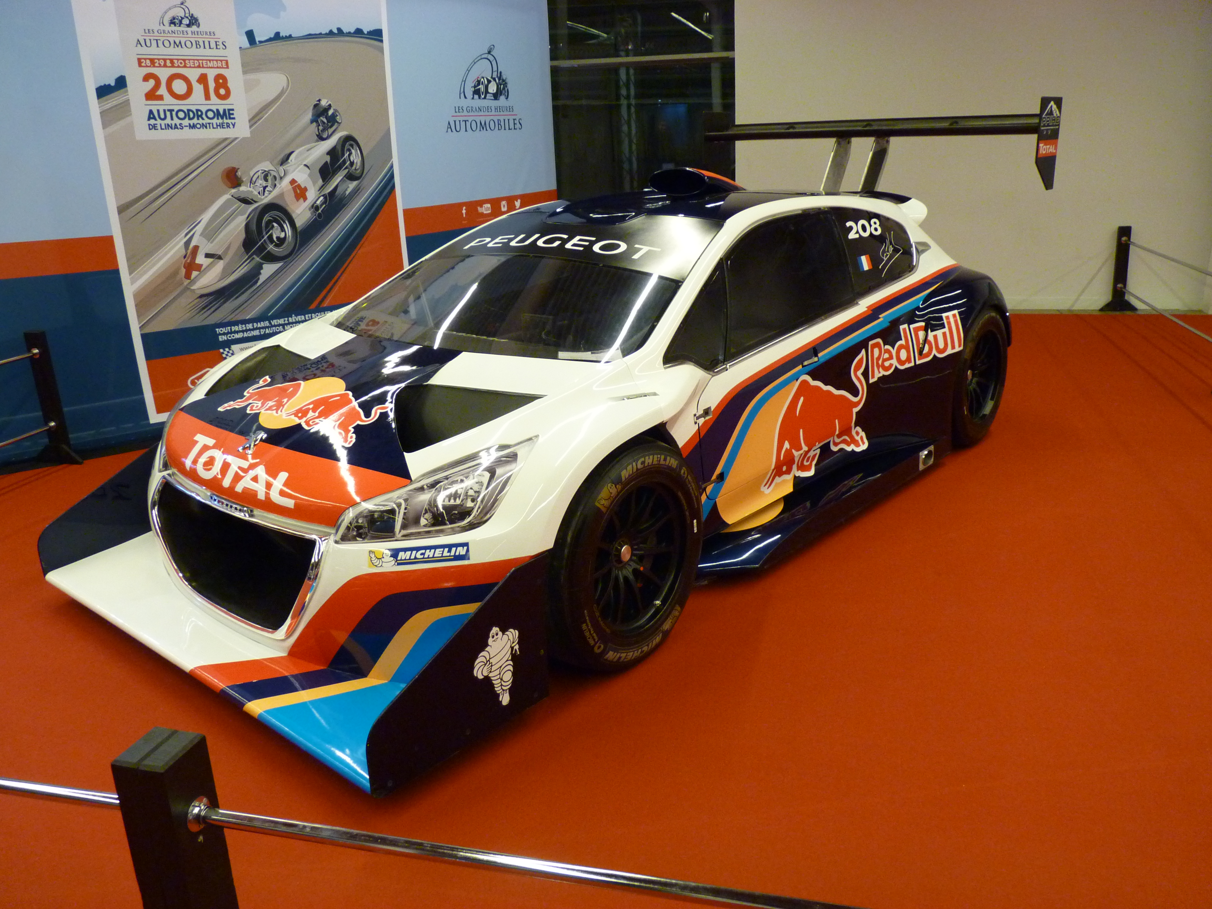 Les Grandes Heures Automobiles à Rétromobile 2018